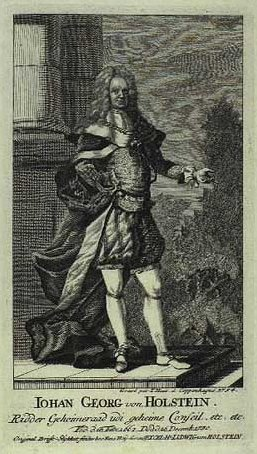 Portrait von Johann Georg von Holstein